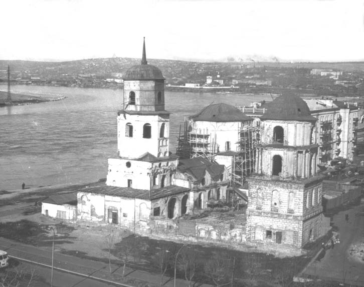 Иркутск. Богоявленский собор. На фото – здание собора перед началом реставрационных работ.